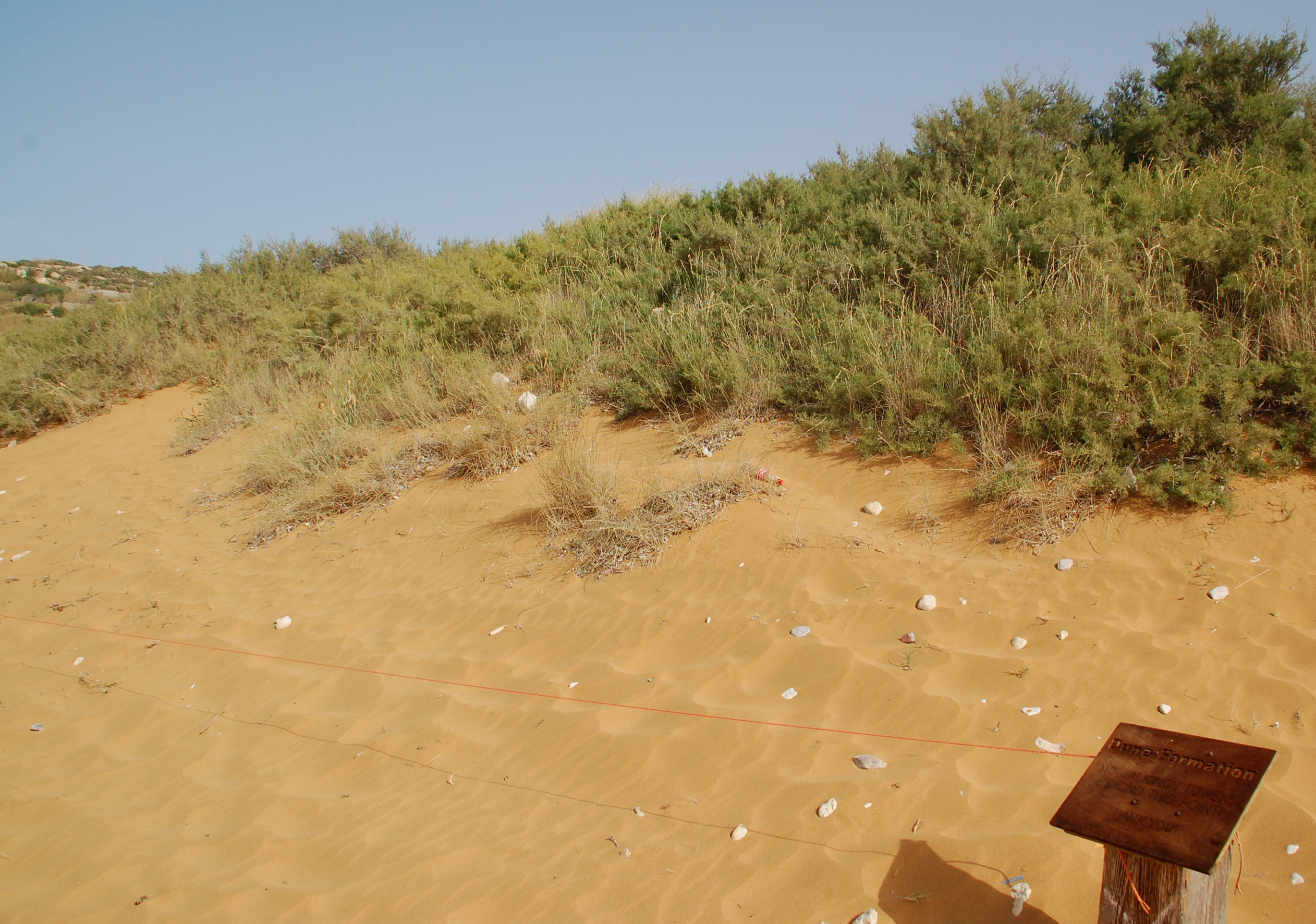 Abgesperrte Dünenformation der Ramla Bay, Gozo, Malta 2010